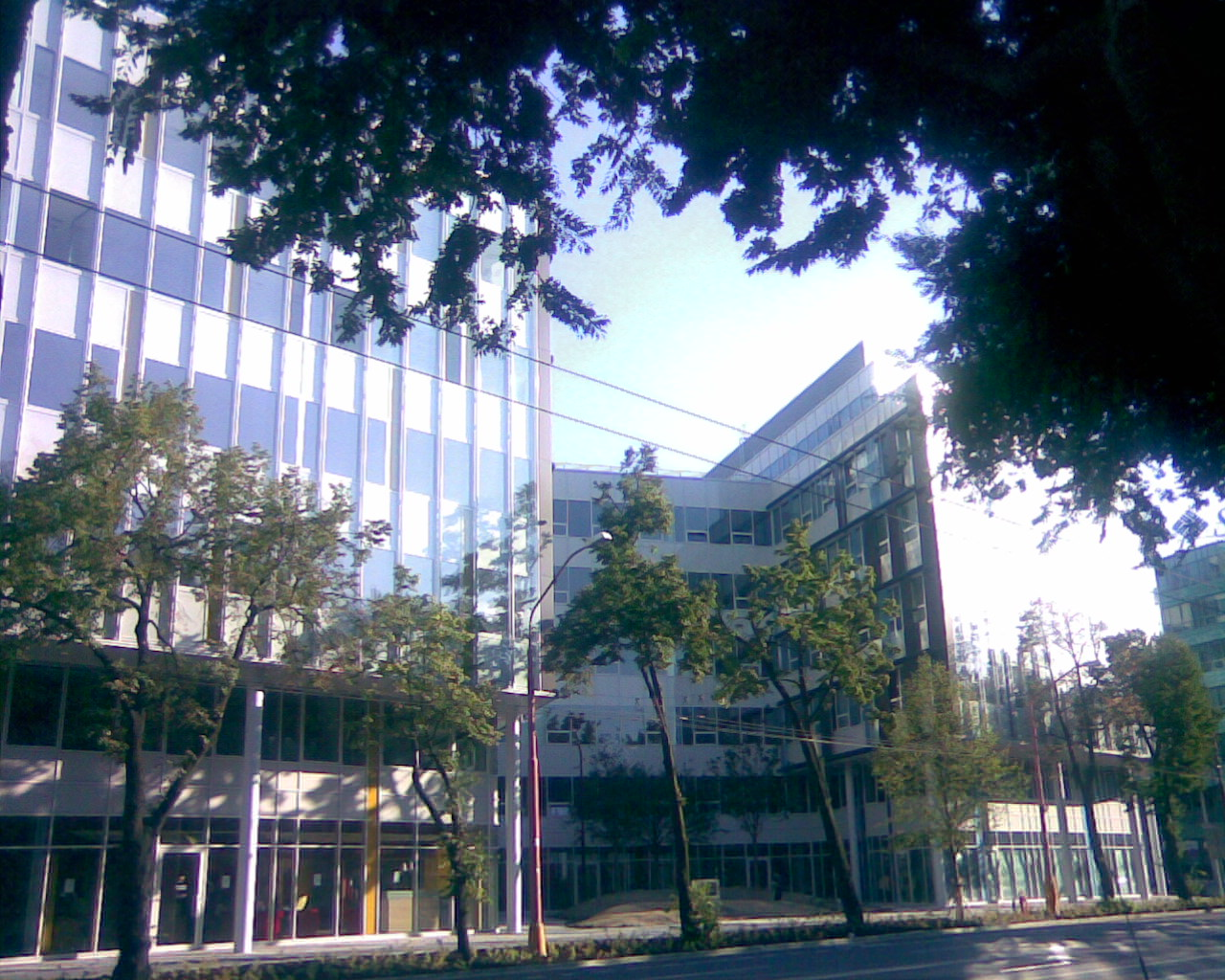 Apollo_Business_Center_II